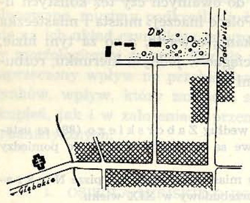 Беларуская (тарашкевіца): Галубічы (Hałubičy)